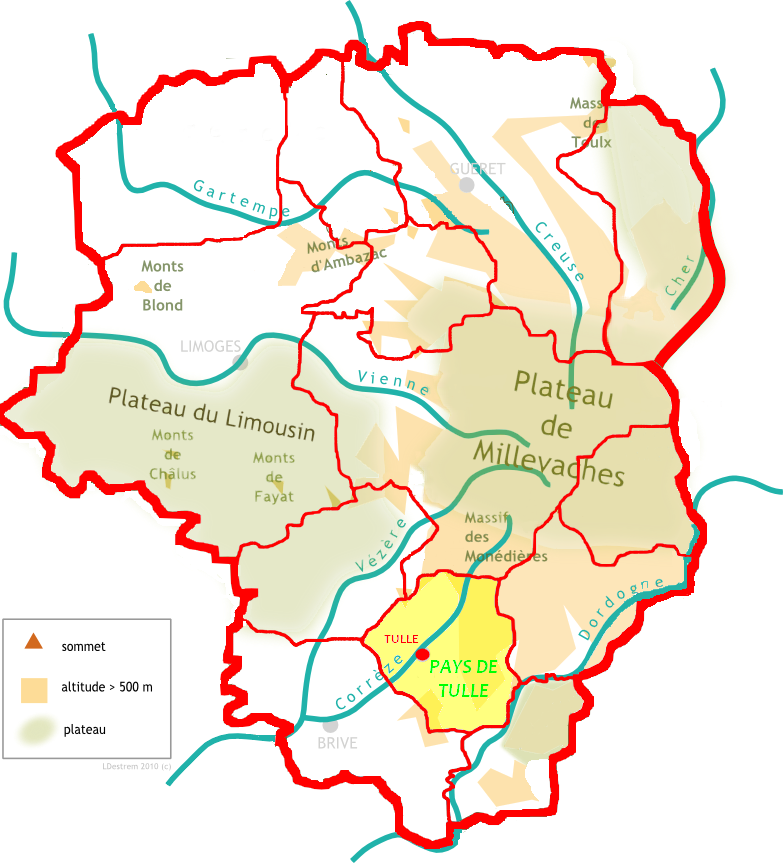 Localisation du pays de Tulle sur la carte des pays traditionnel du Limousin